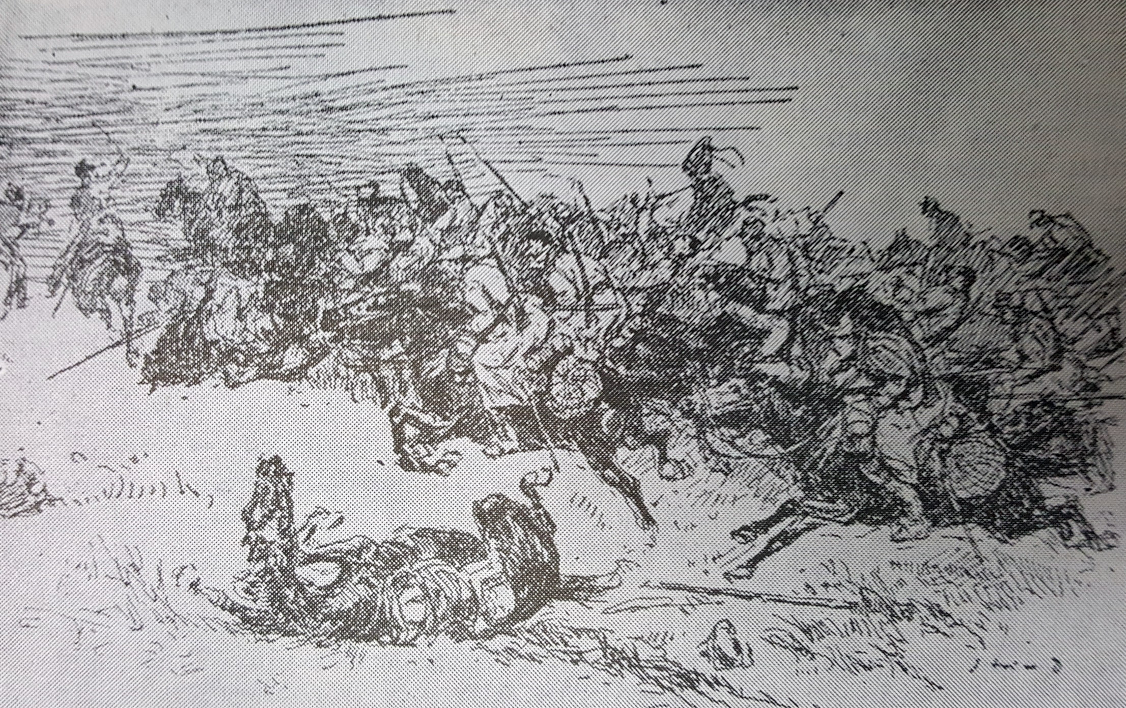 1916 - Sarja a cavaleriei romane in luptele de la Bazargic desen de D Stoica